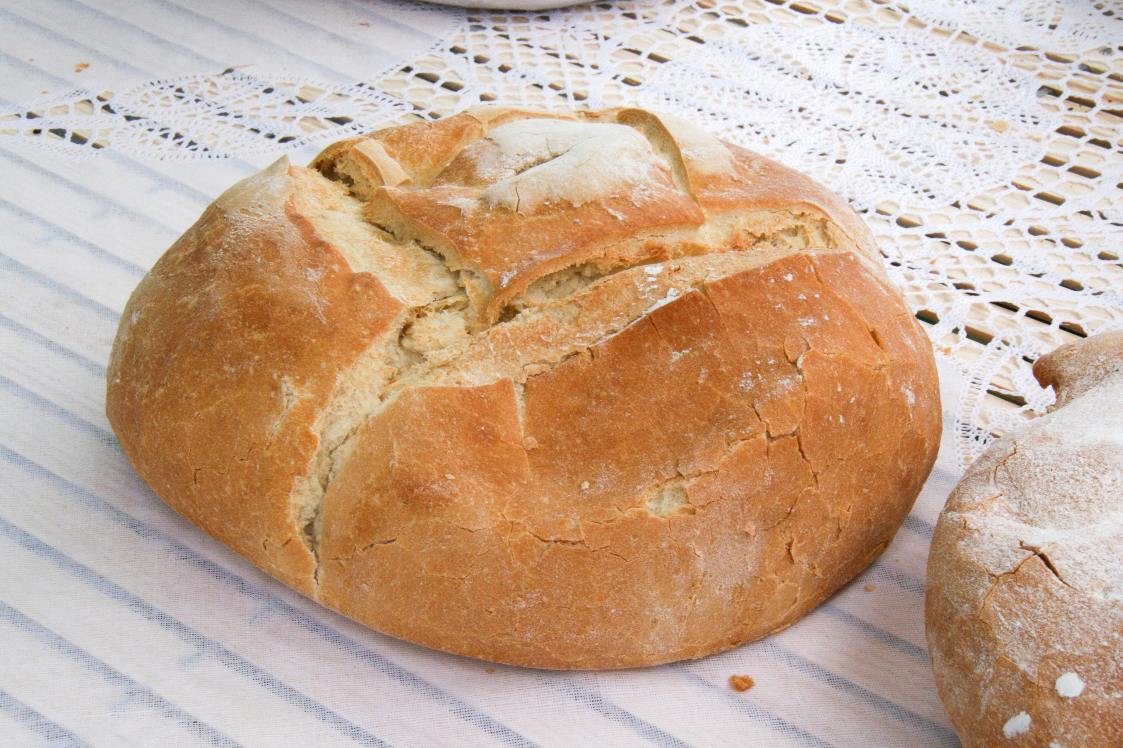 Pan de Alicante